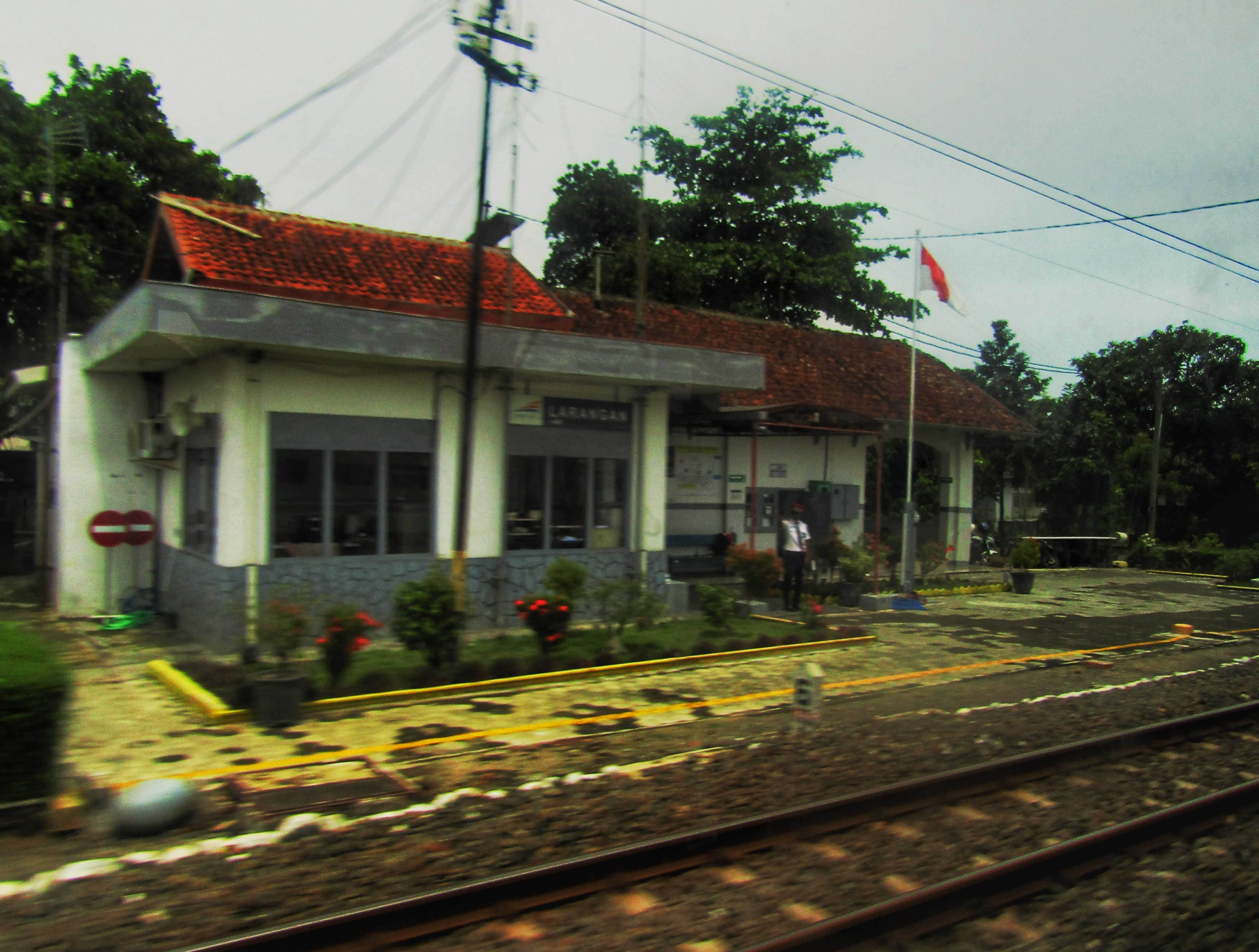 Tampak peron bangunan Stasiun Larangan Tegal, 2019, dengan PPKA tunjuk-sebut Semboyan 1.